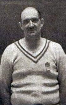 Philippe Cattiaux en 1932 aux JO de Los Angeles.